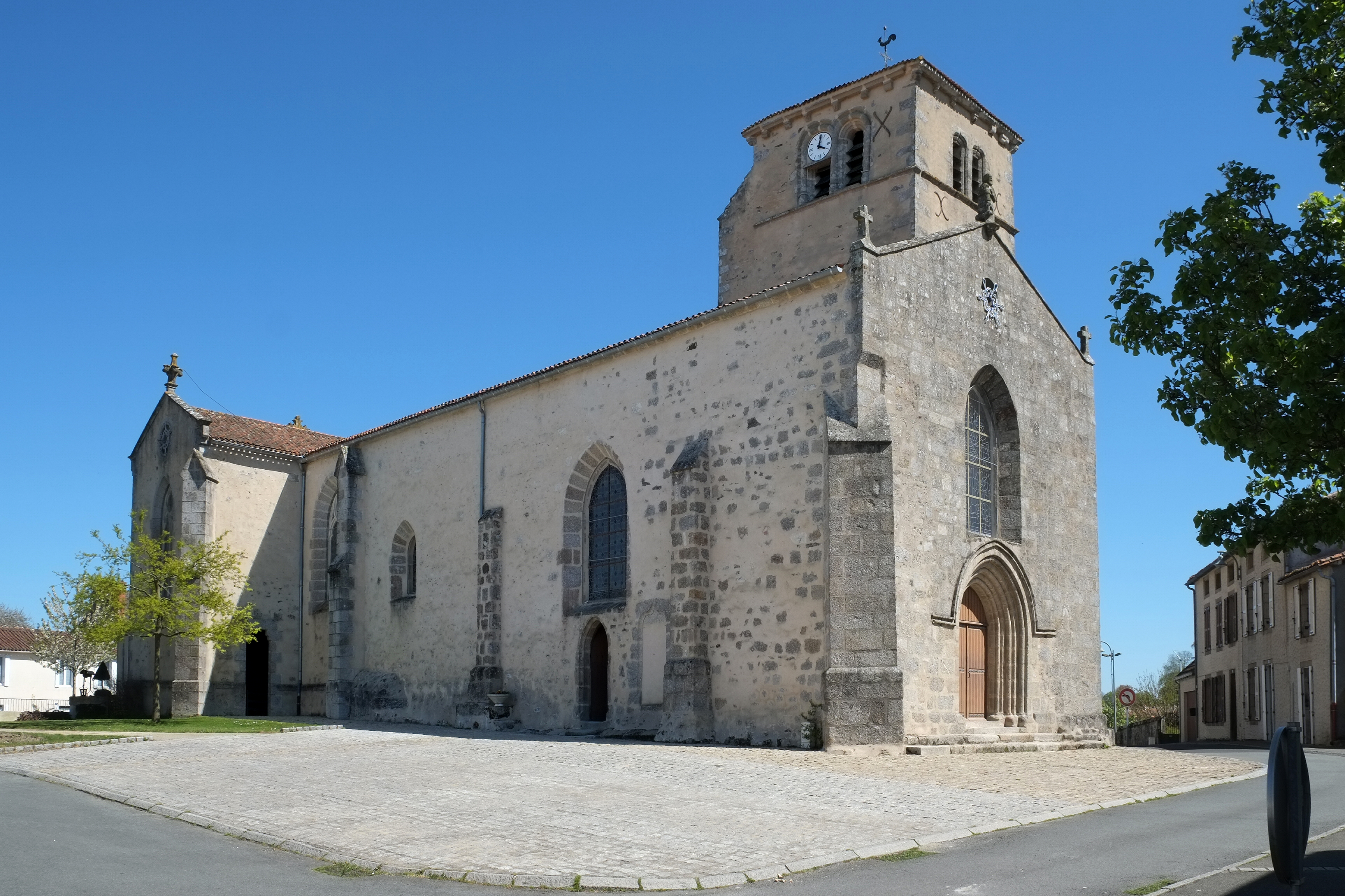 Église Saint-Étienne Largeasse Deux-Sèvres France